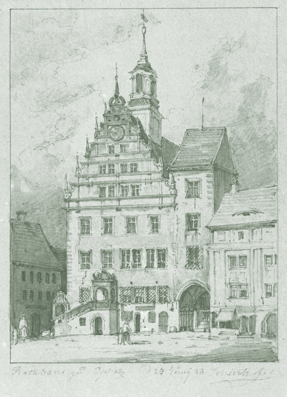 Bleistiftzeichung des Rathaus Oschatz 1838